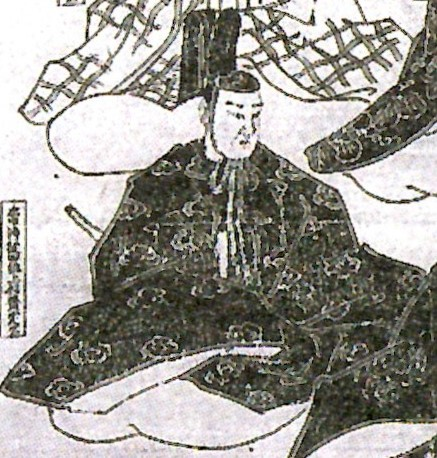 上杉斉定の肖像。